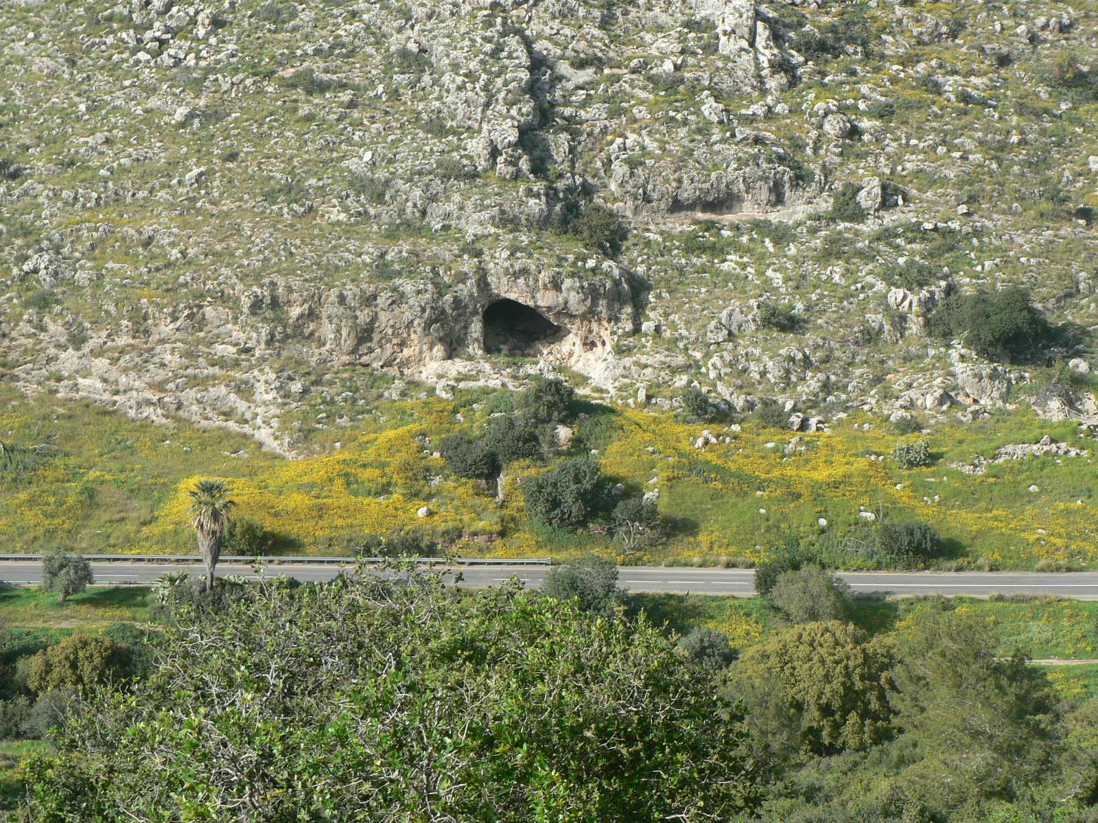 האתר הארכיאולוגי נחל אורן, הכרמל, ישראל